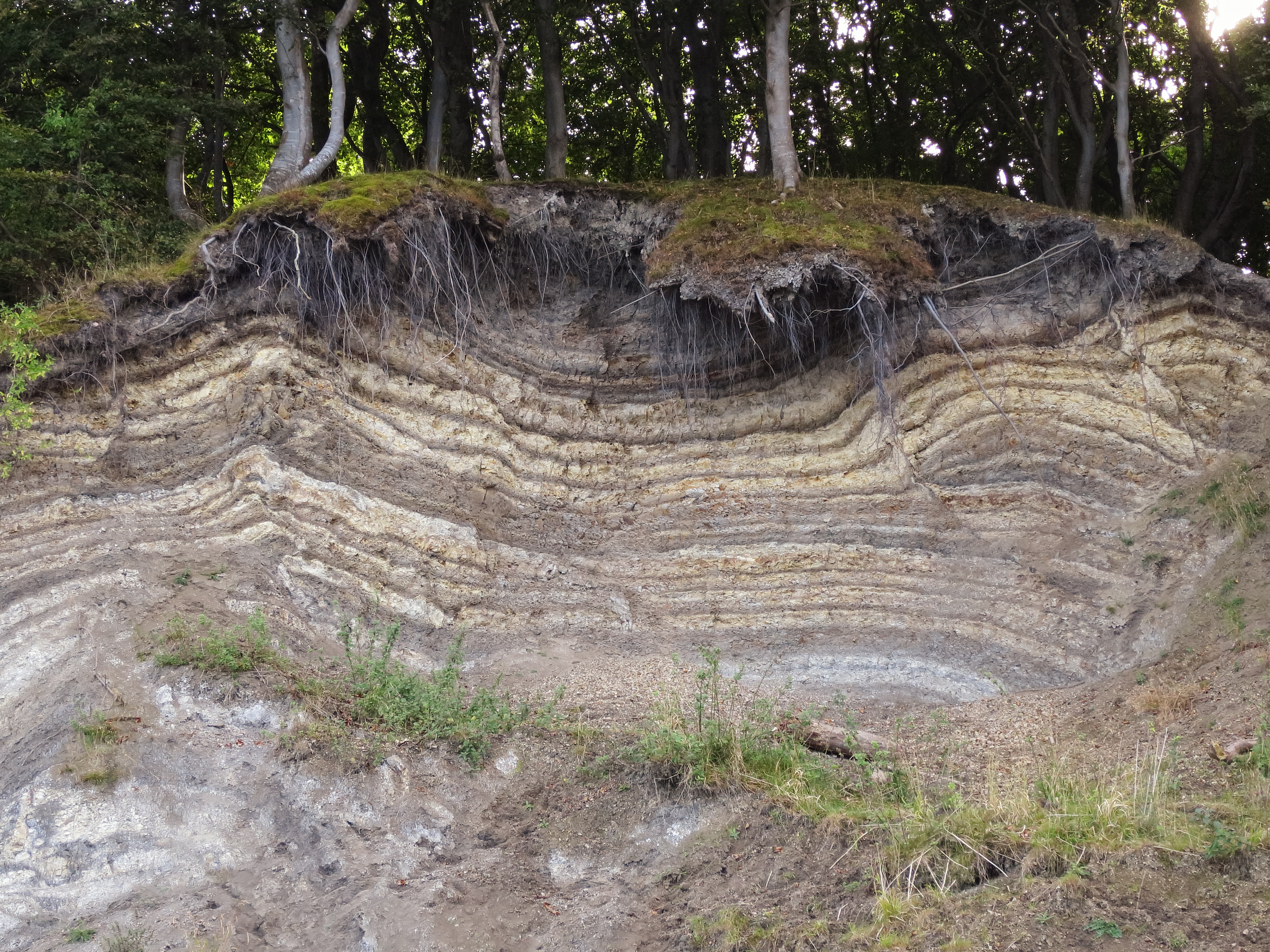 Ler fra tertiærtiden som har et højt indhold af mineralet smectit.